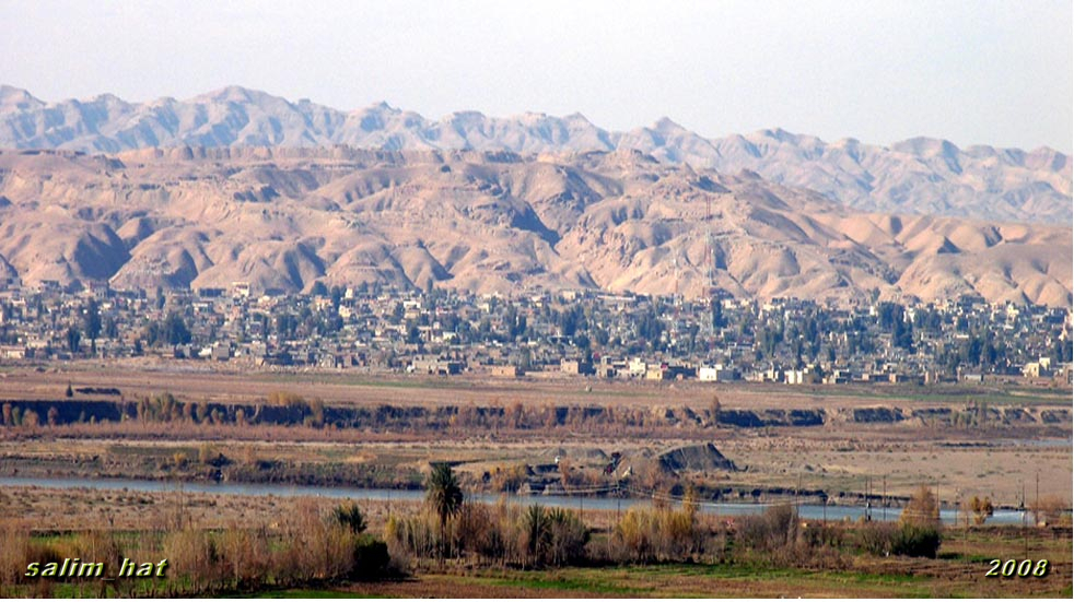 الزوية قبل غزوة داعش